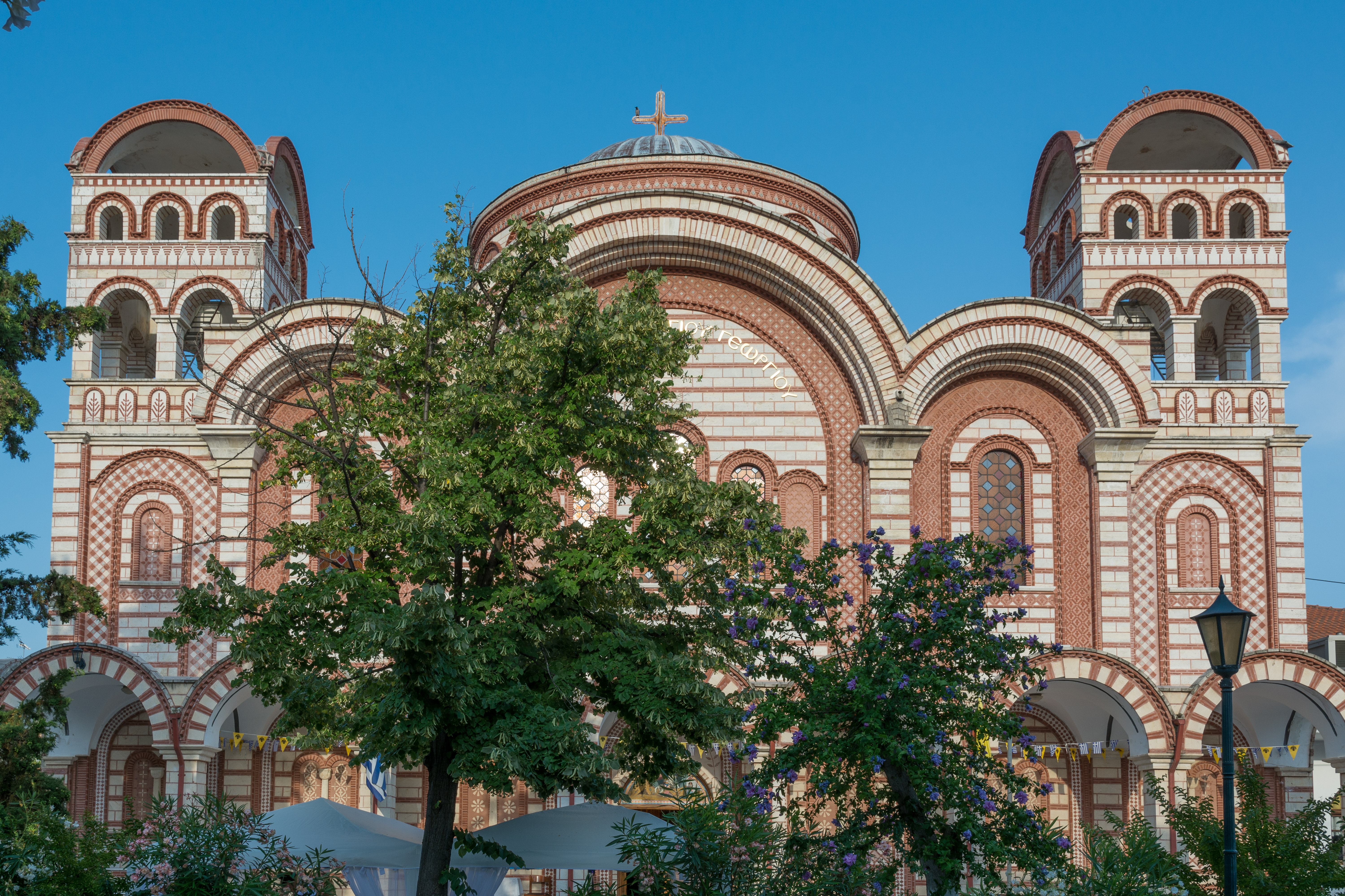 Ασπροβάλτα